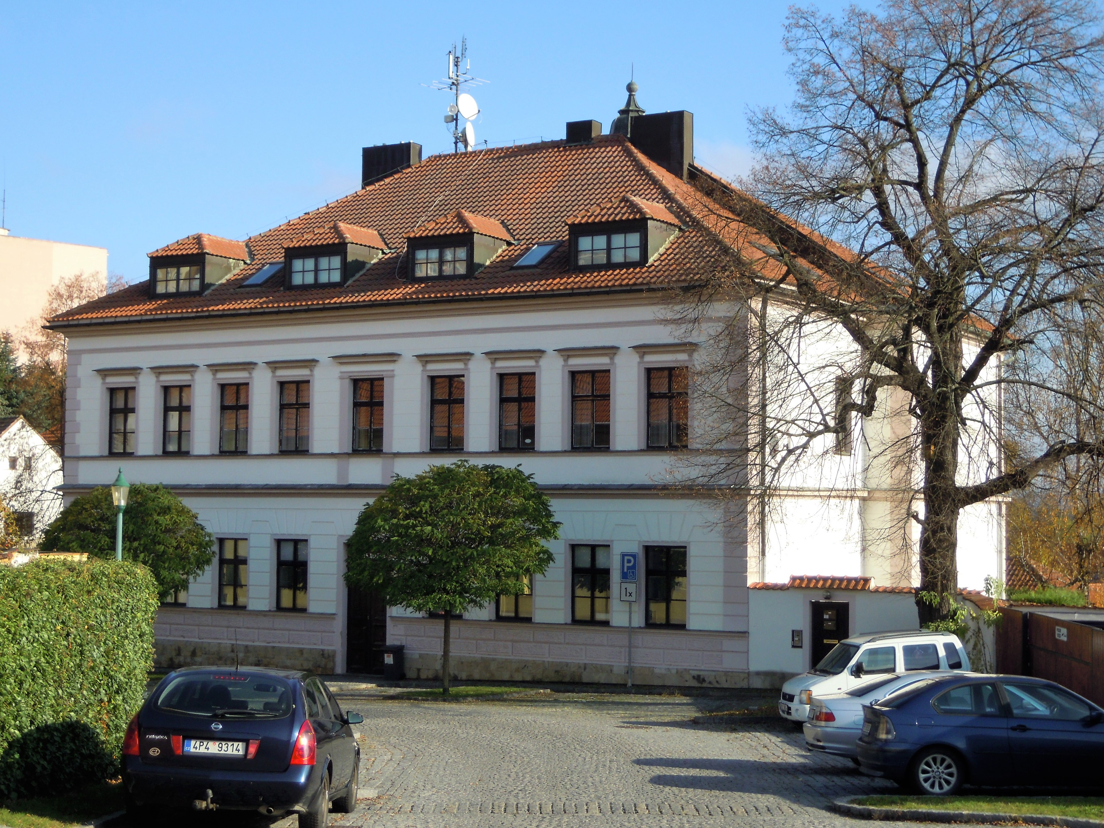 Plzeň-Bolevec, Vondruškova ulice, původní budova základní školy v Bolevci (čp. 9) z roku 1893